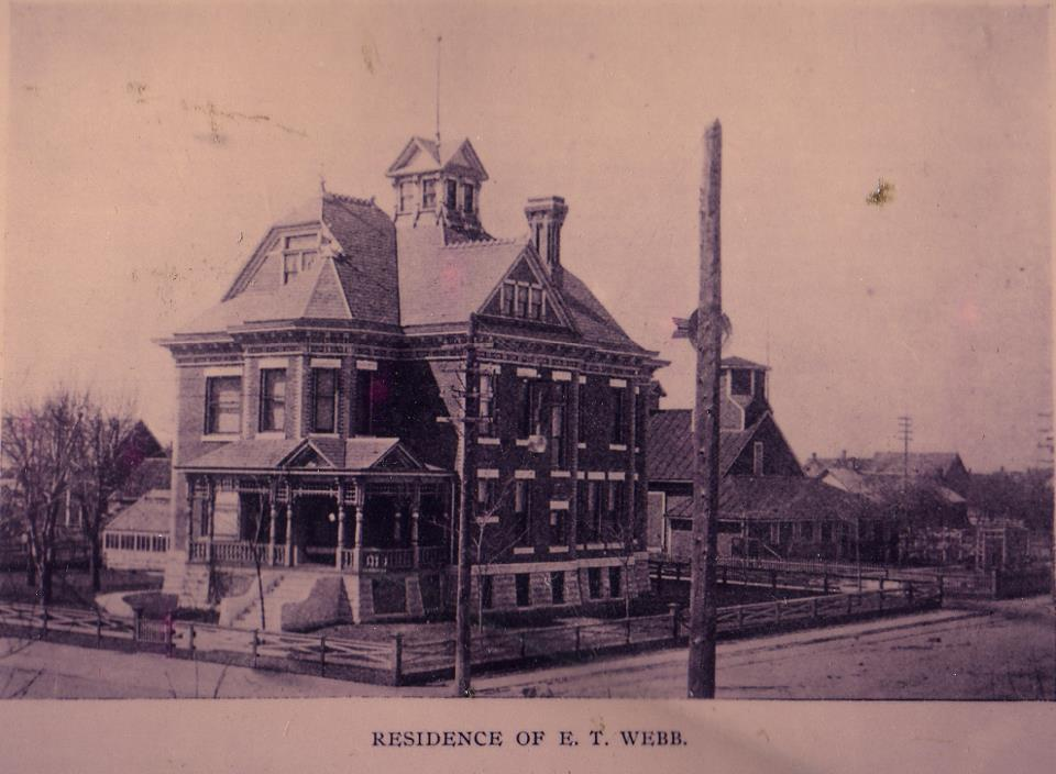 Historic photo of The Elijah Thomas Webb Residence